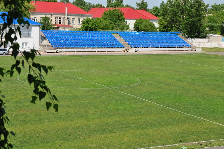 Стадион в Раздельной